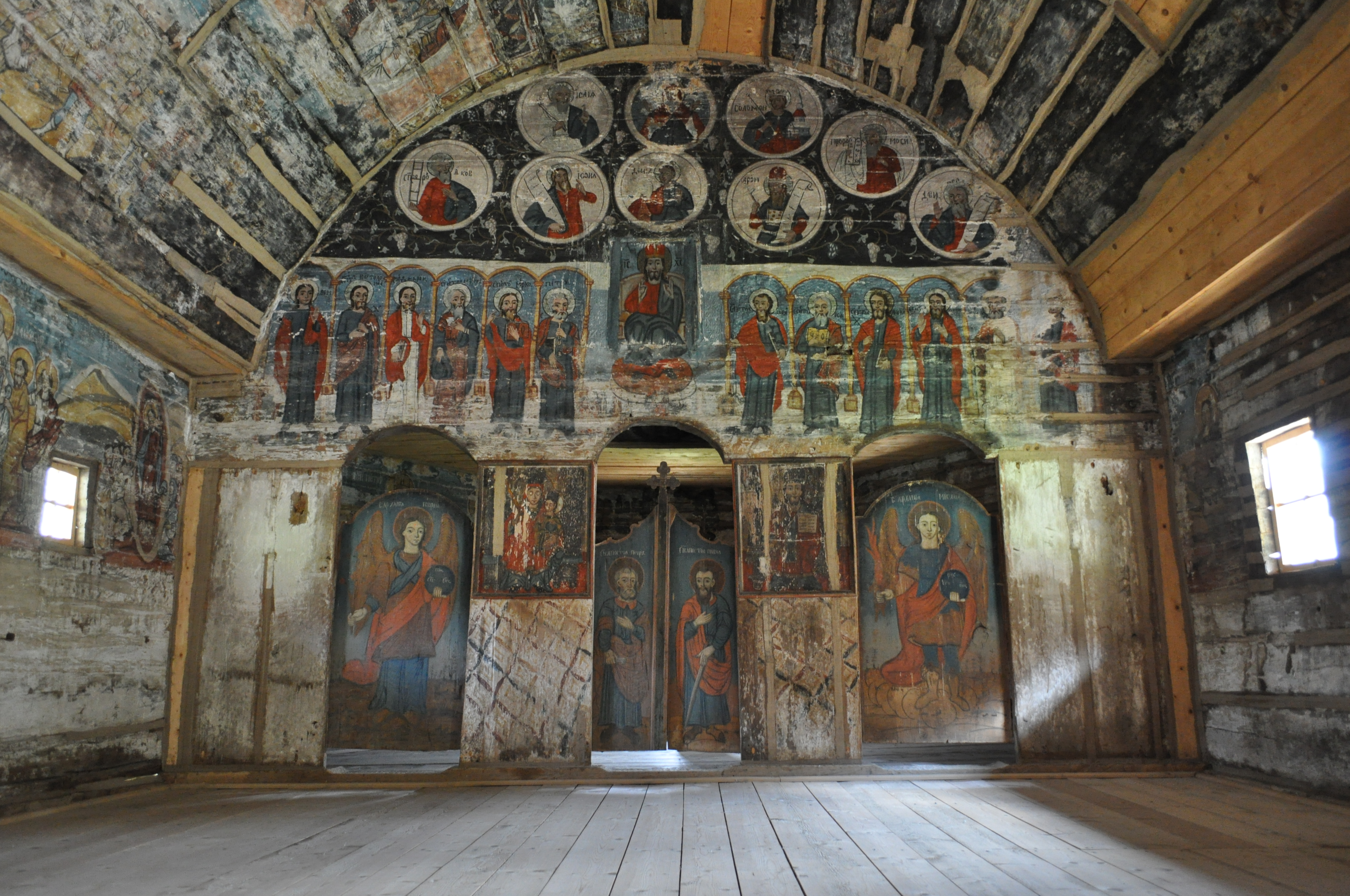 Biserica de lemn „Sf.Trei Ierarhi” din Troaș